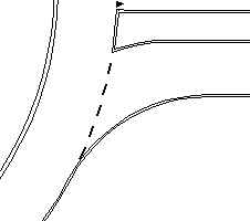 Kanalisatiestreep